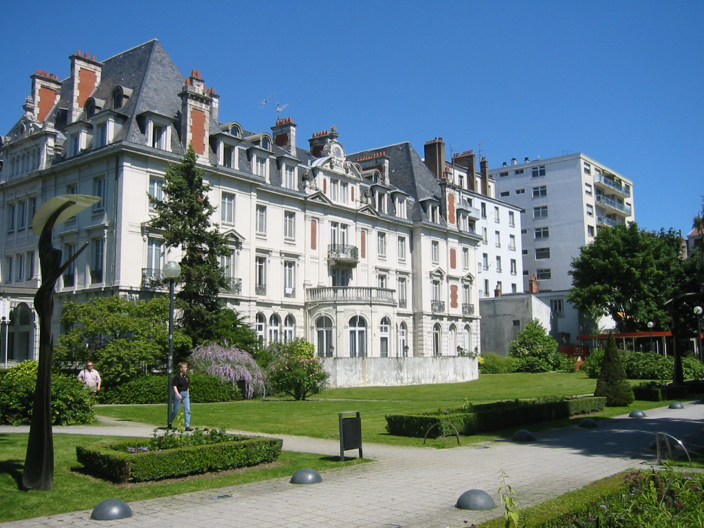 Ancien Hôtel de Besançon les Bains